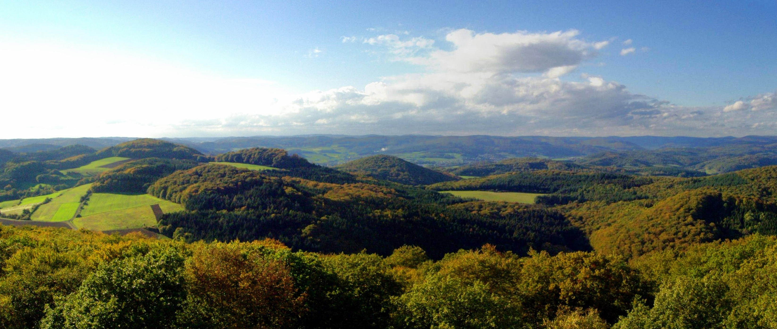 Blick vom 498 m hohen Rimberg auf die westlicheren Damshäuser Kuppen. In der linken Bildhälfte gut erkennbar: Der Sattel zwischen Bauerst (470m, linker Bildrand) und Hoher Höll (481m) mit dem dahinter liegenden Schweinskopf (473m), rechts davon Kappe (494m), Ehlenholz (ca. 470m) und Treisberg (437m, Bildmitte). Mittig im Hintergrund verschiedene Teile der Gemeinde Dautphetal und die dahinter liegenden, ebenfalls zum Gladenbacher Bergland zählenden Erhebungen des Breidenbacher Grundes. Rechts im Hintergrund die Stadt Biedenkopf und das Rothaargebirge.